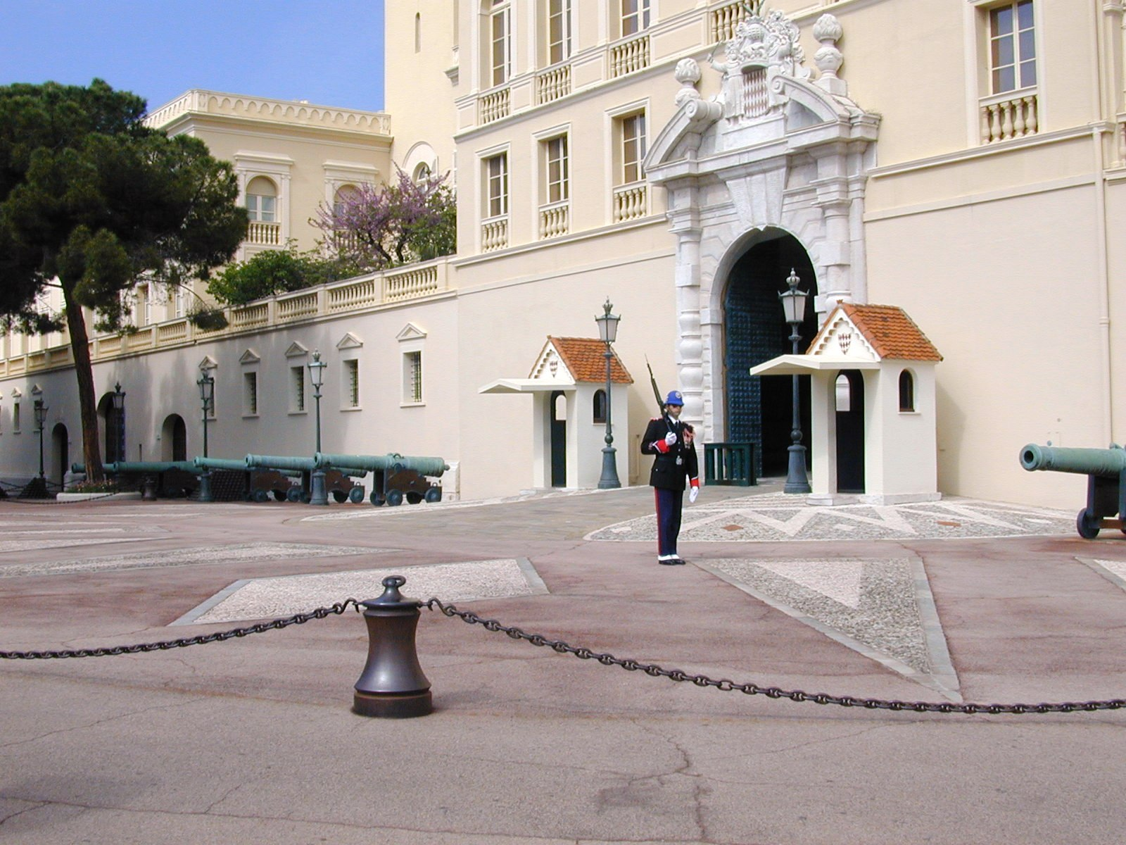 Monaco, Wache vor dem Palast